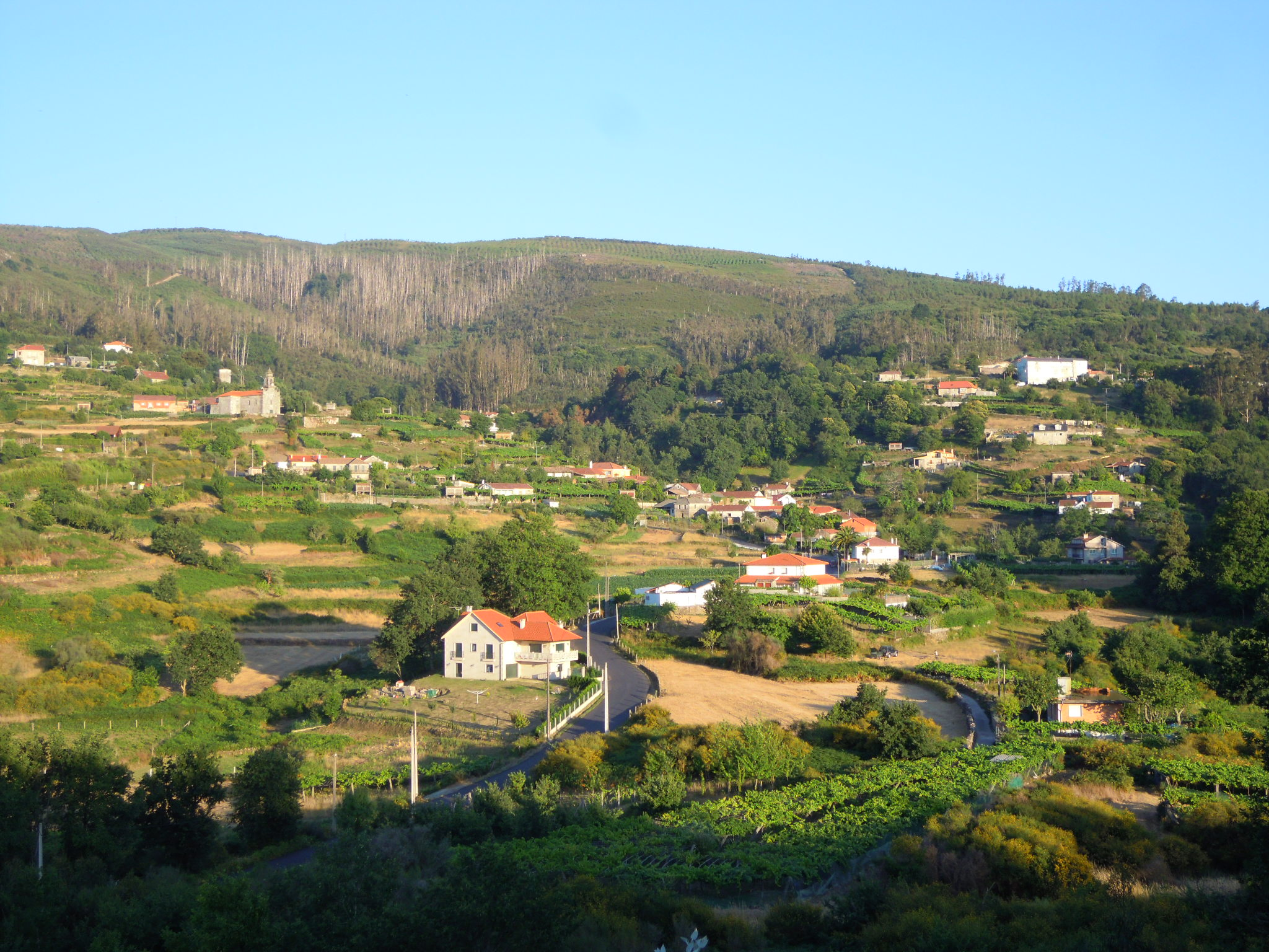 Vista xeral de San Xurxo de Sacos (Cerdedo-Cotobade). Lugares de Fontán (no centro, coa igrexa parroquial), O Outeiro (á esquerda), A Longa (á dereita) e Lombo do Muíño (ao fondo, con eucaliptos queimados na vaga de incendios forestais de 2006).Imaxe tomada desde o camposanto do Castro.